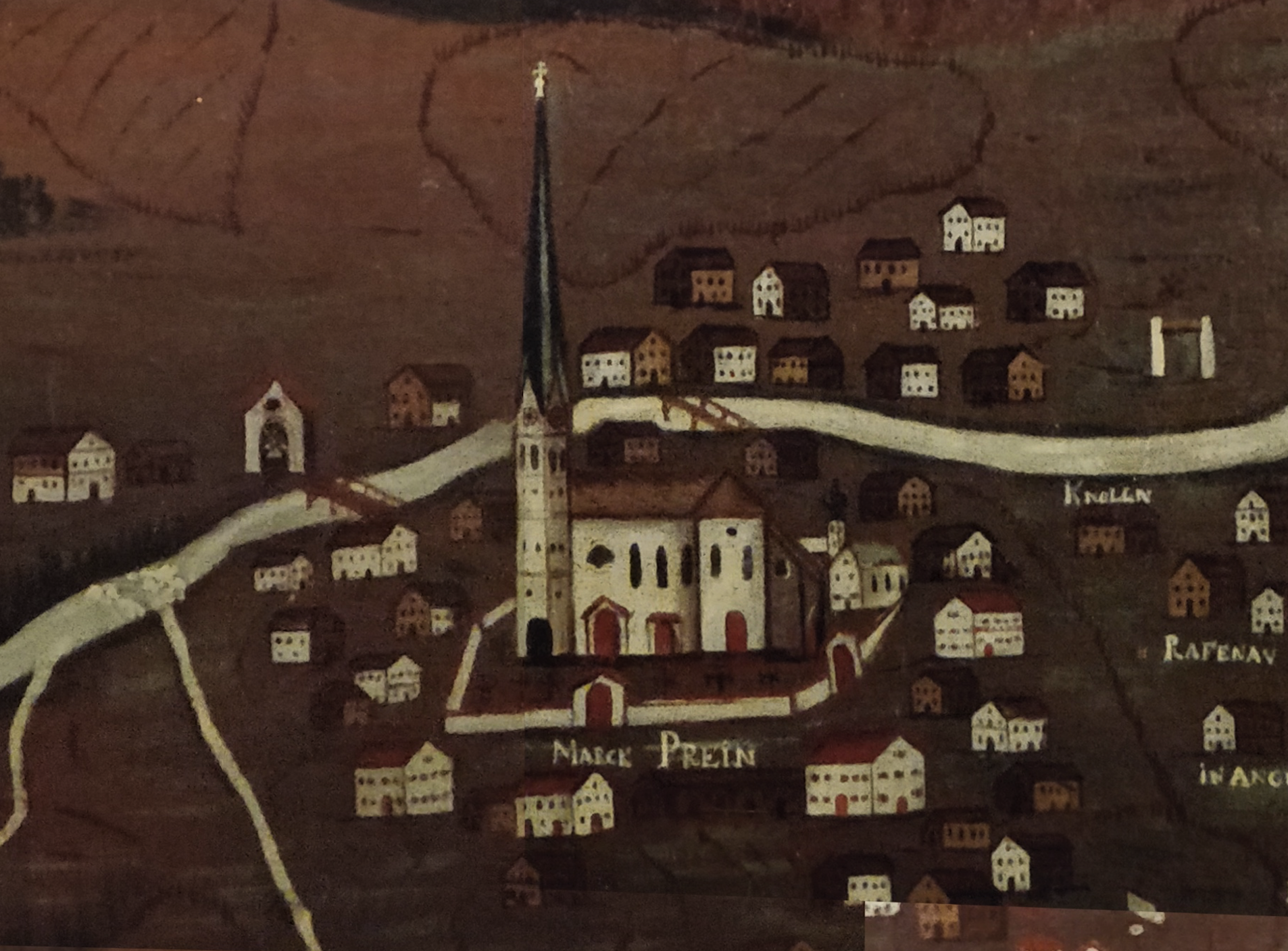 Ausschnitt „Prien“ einer historischen Karte